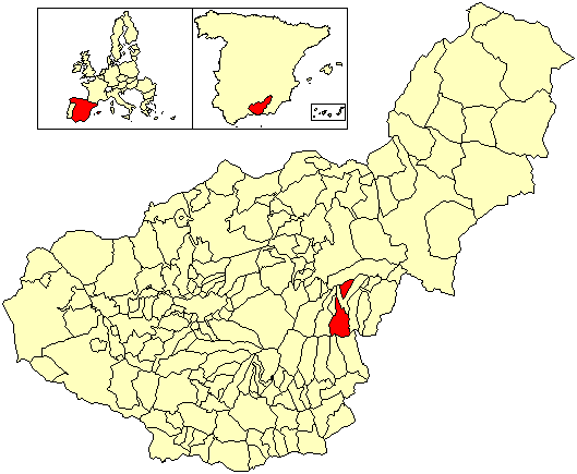 Situación del término municipal de Aldeire respecto a la provincia de Granada, en España.